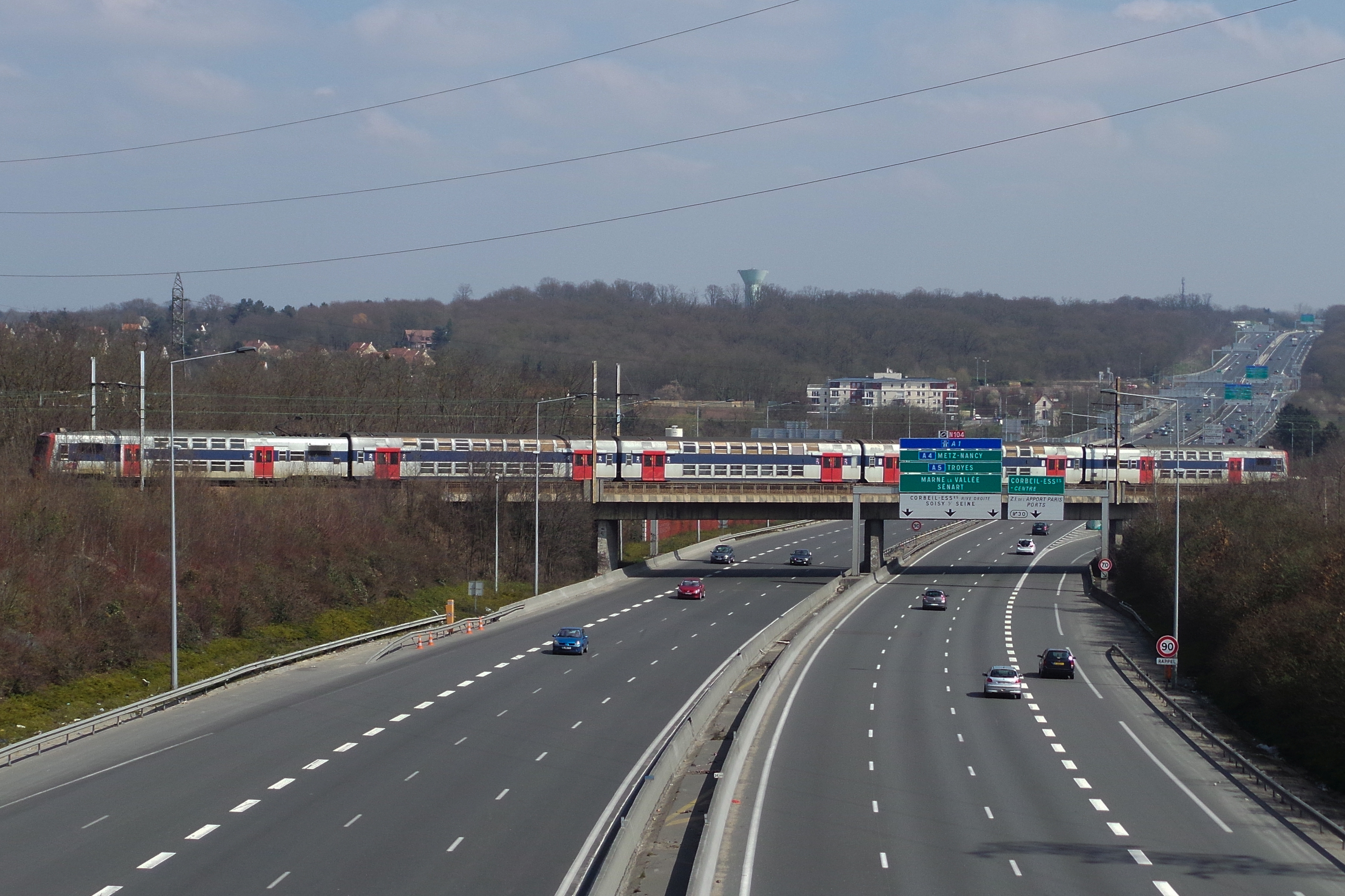 Pont-rail au-dessus de la Francilienne à Corbeil-Essonnes, Essonne, France.